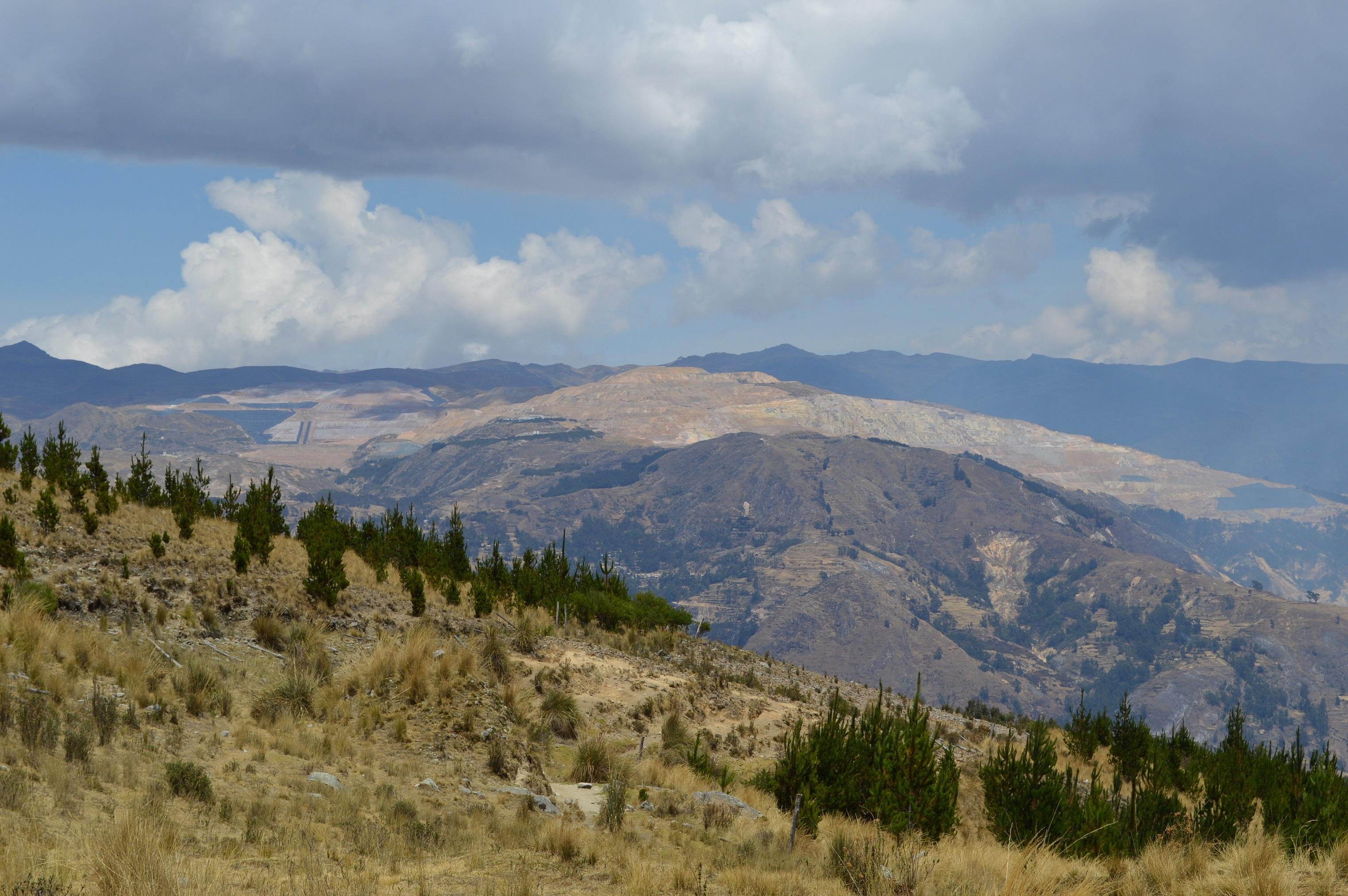 Foto tomada en la laguna Radián, en el distrito de Independencia de la provincia de Huaraz, Áncash - Perú, lunes 30 de septiembre de 2019.